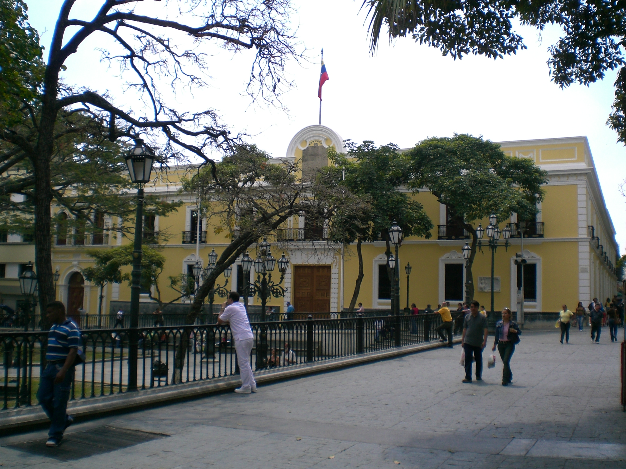 Casa Amarilla (Yellow House), Caracas, Venezuela